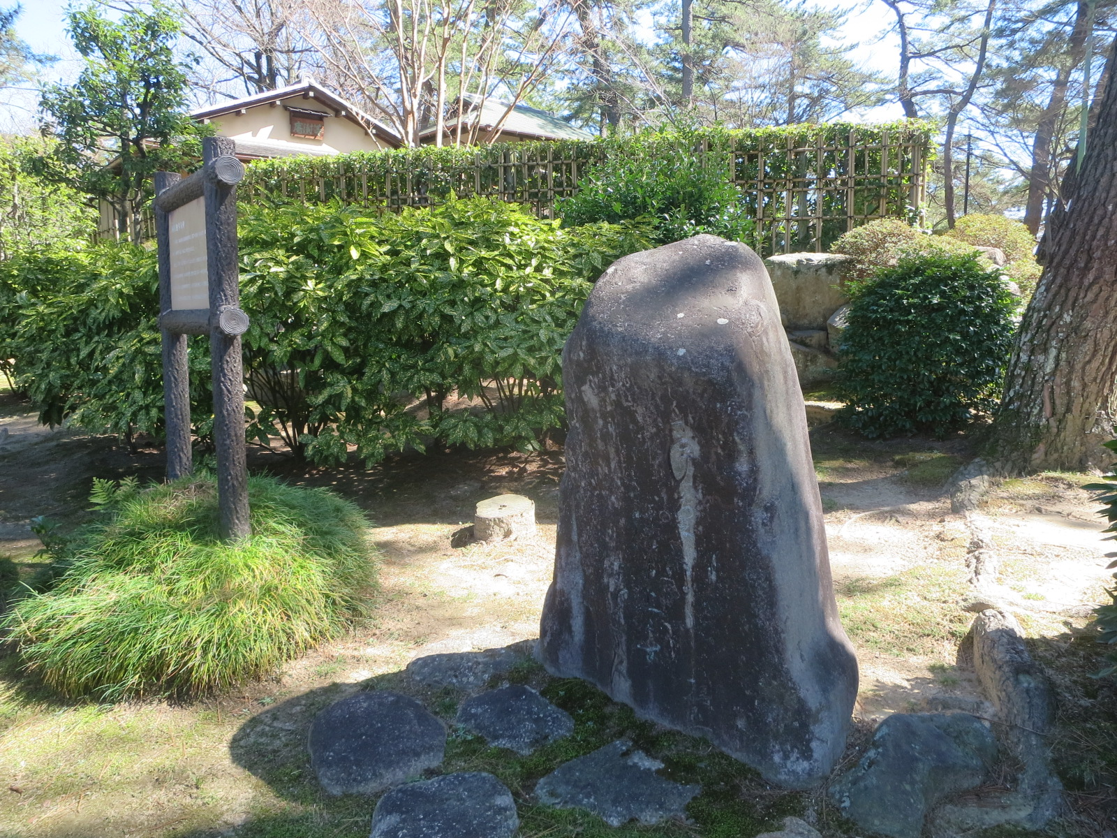 岡田撫琴句碑（岡崎市東公園）